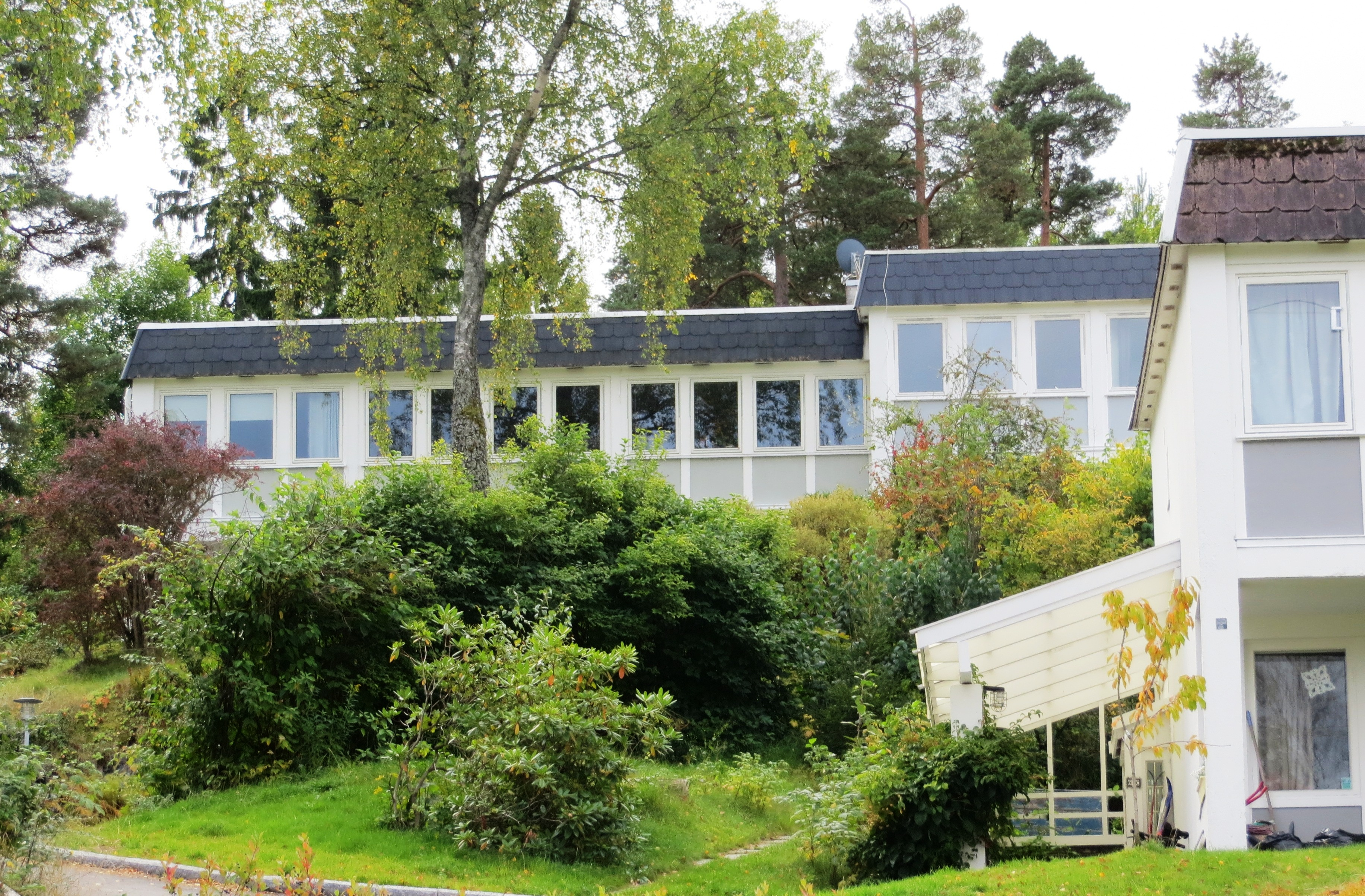 Kommunalt vernet boligkompleks (Byantikvarens gule liste) i Ostadalsveien, området Rustad / Ullernåsen / Røa i Oslo.